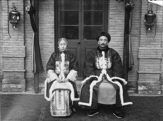 唐紹儀和張氏